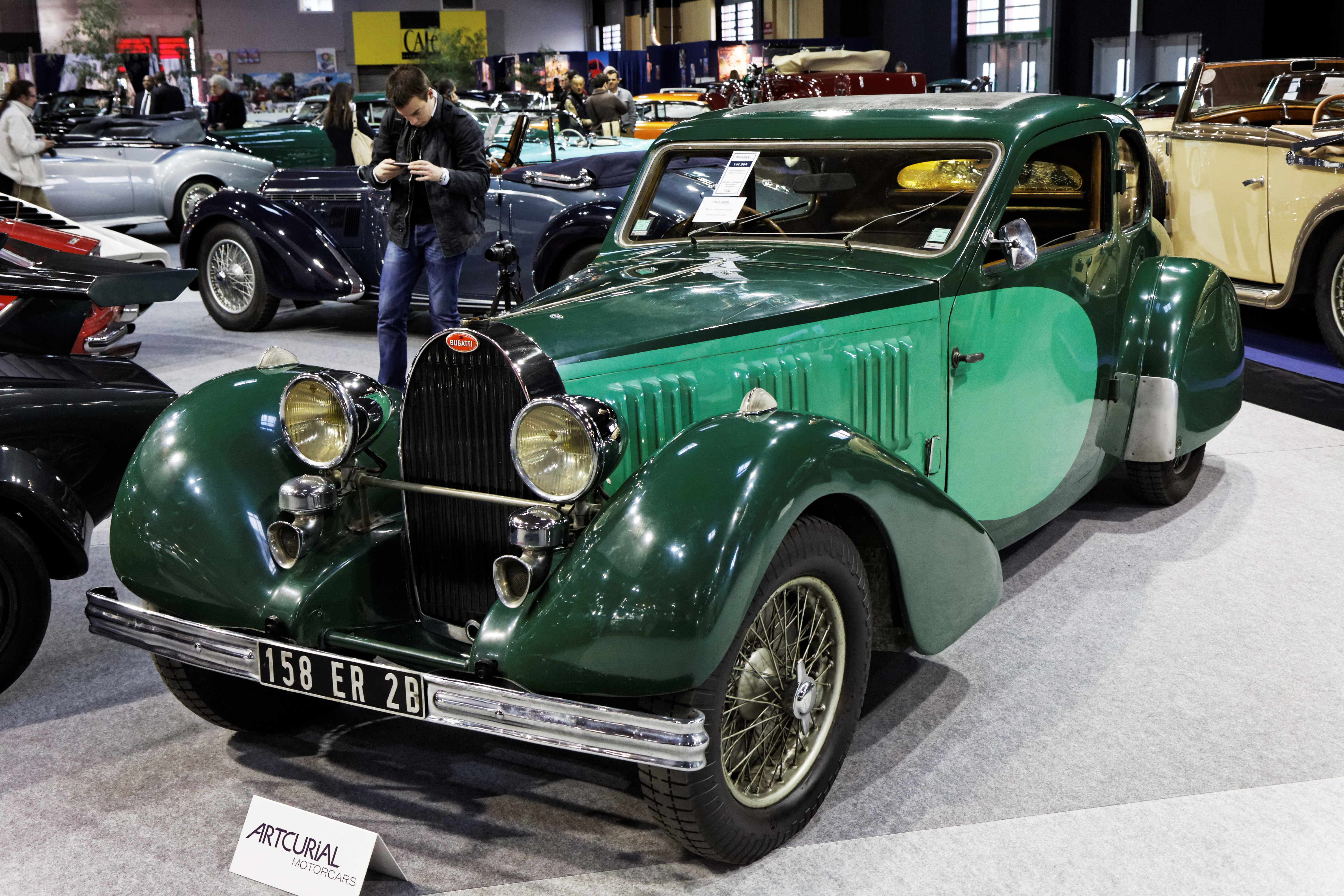 Une Bugatti 57 Coach Ventoux présentée lors du salon Retromobile 2013.